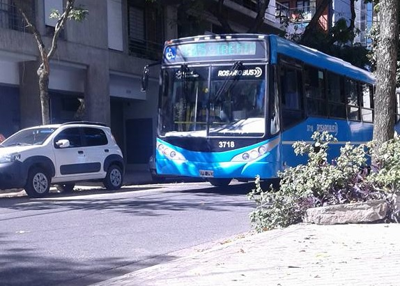 Mercedes-Benz de la Línea 145 que llega hasta la ciudad universitaria de Rosario